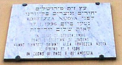 no original description